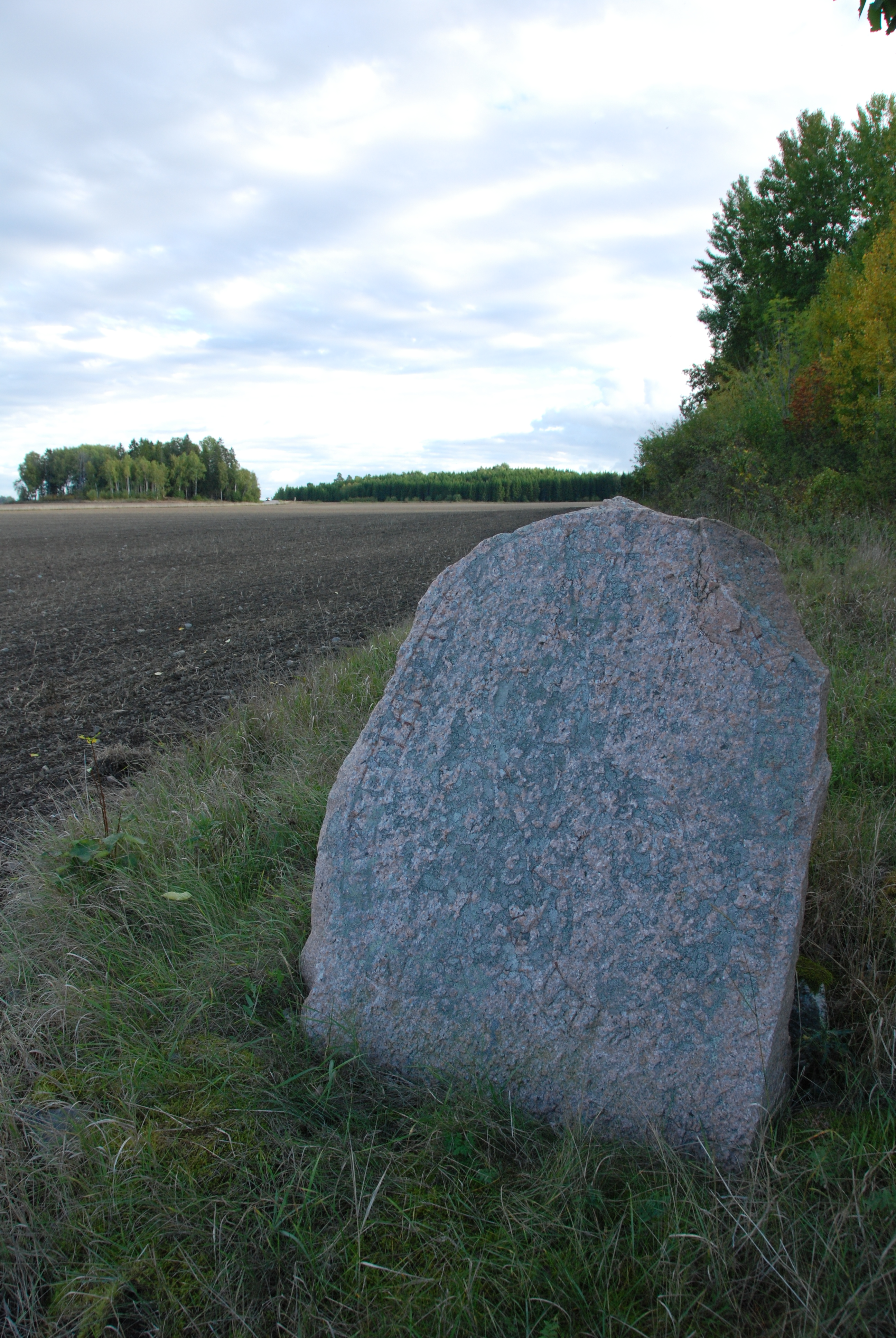 Häggeby 35:1